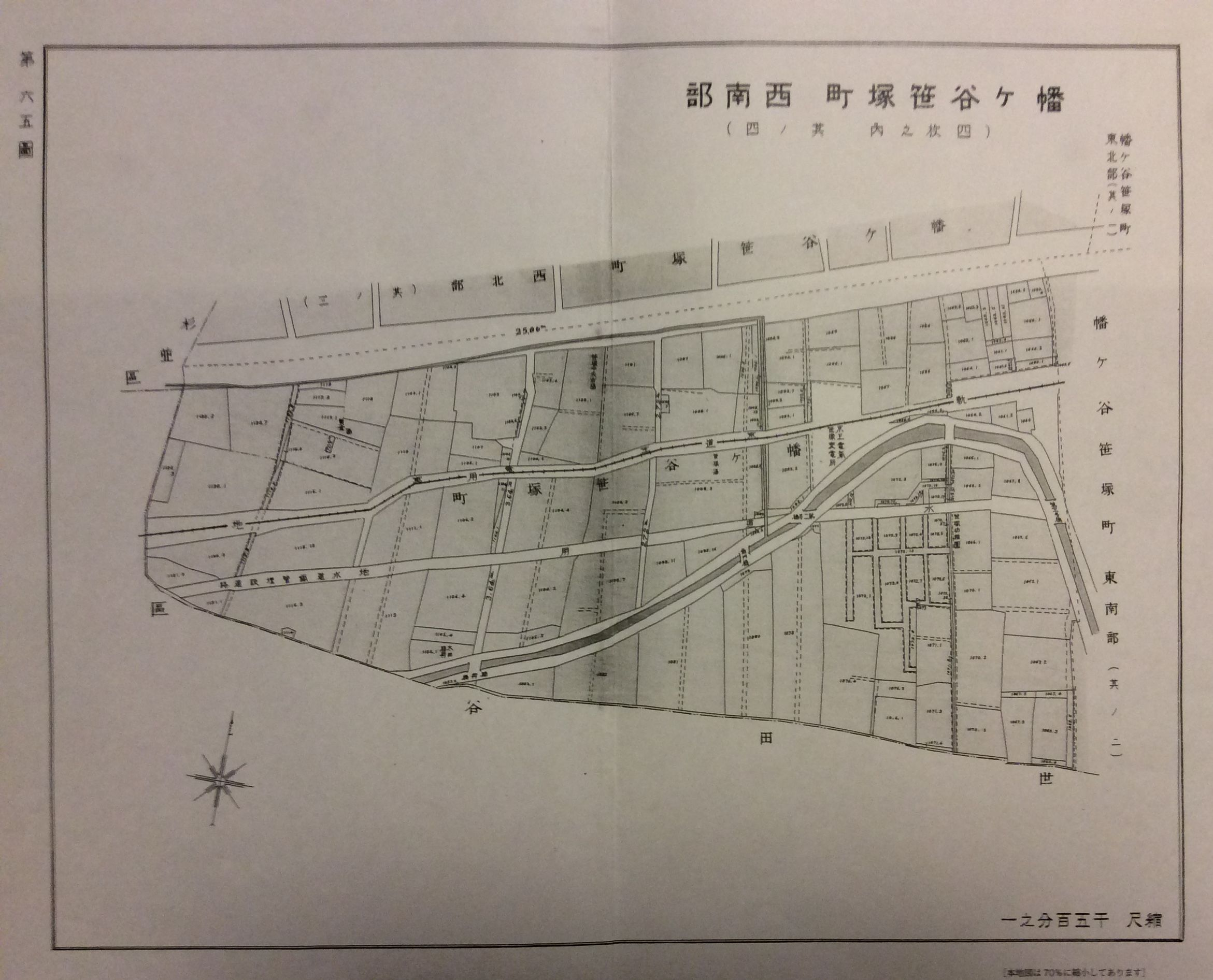 （2014年12月25日撮影）